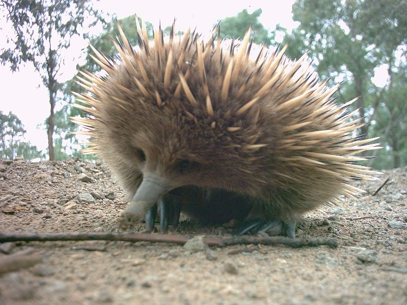 Australian Echnidna